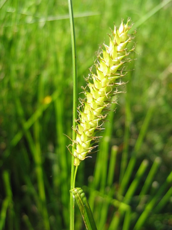 weibliche Ähre der Blasen-Segge Carex vesicaria, Karnin